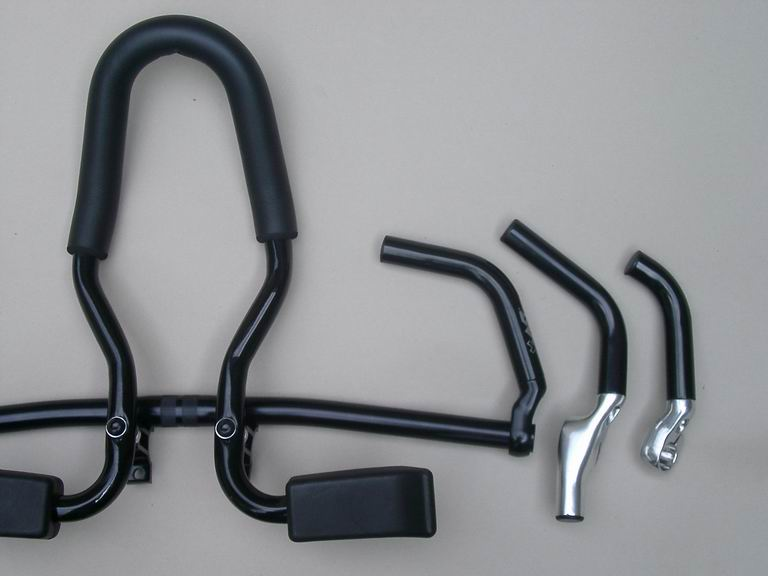 Erweiterungen für Fahrradlenker (Barends, Triathlon-Aufsatz)